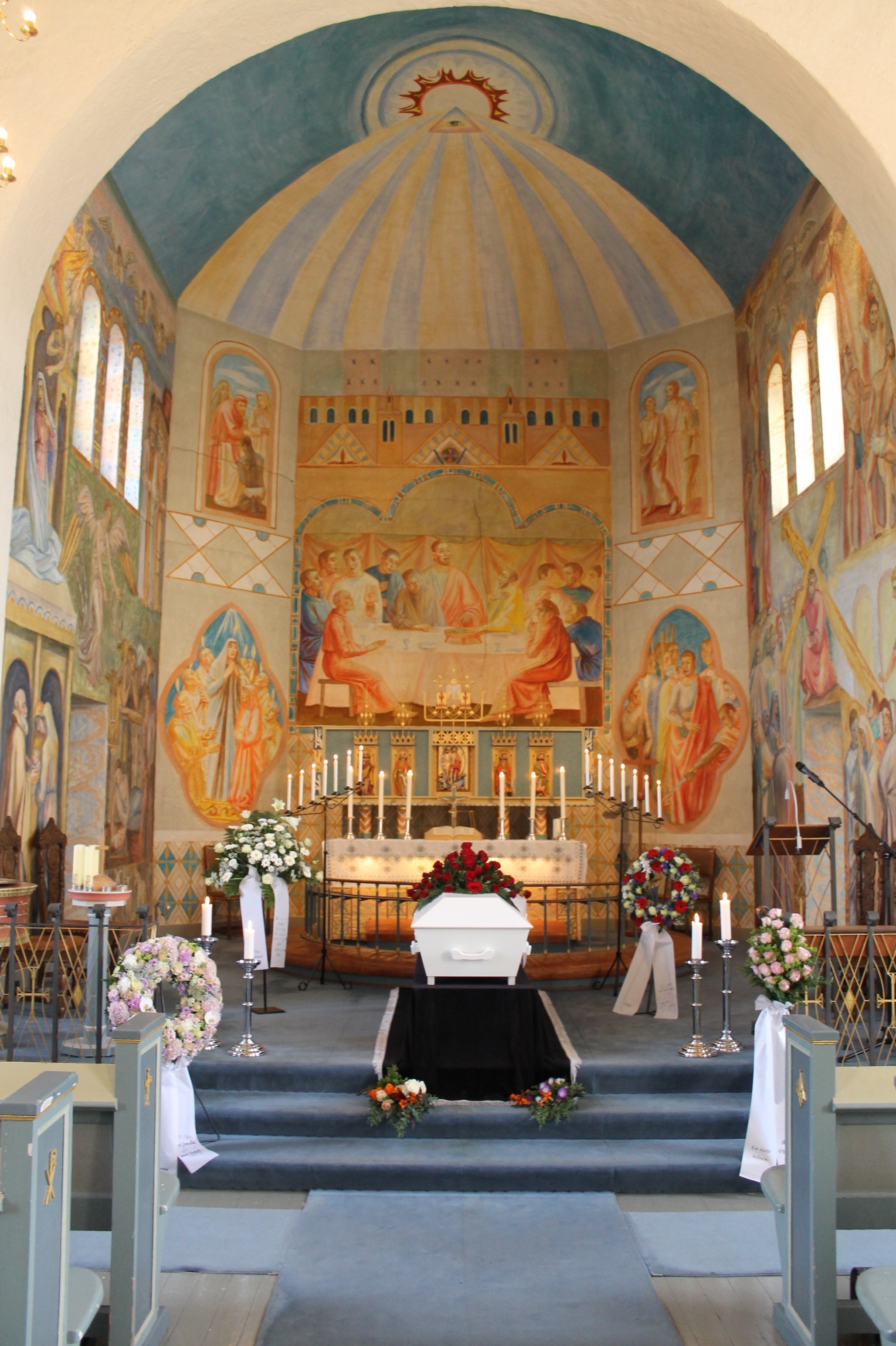 Kiste med bårebuketter ved begravelse i Slagen kirke i Tønsberg i Vestfold 2015. Kirken ble innviet 1901 og restaurert i 1956. Freskomaleriene er malt av Kåre Øijord 1955–1958.